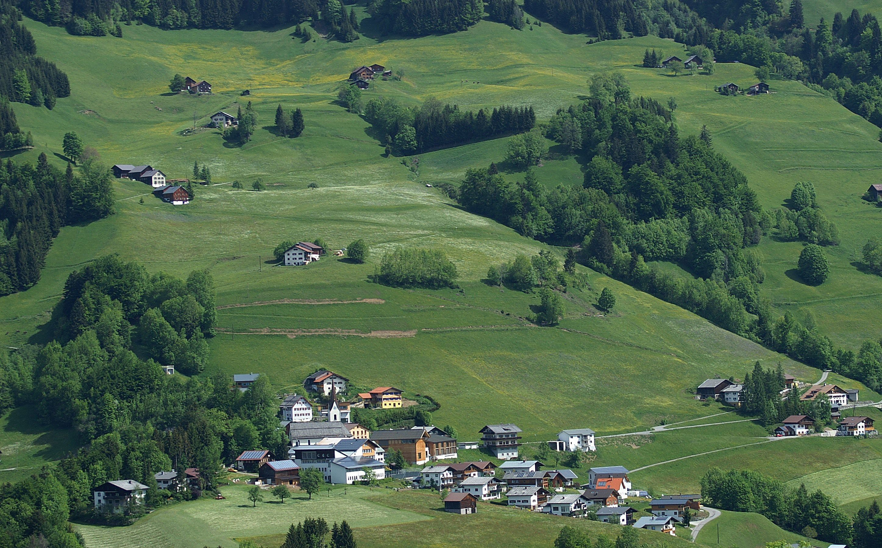 Blick von Raggal hinüber auf Blons im grossen Walsertal, Vorarlberg.